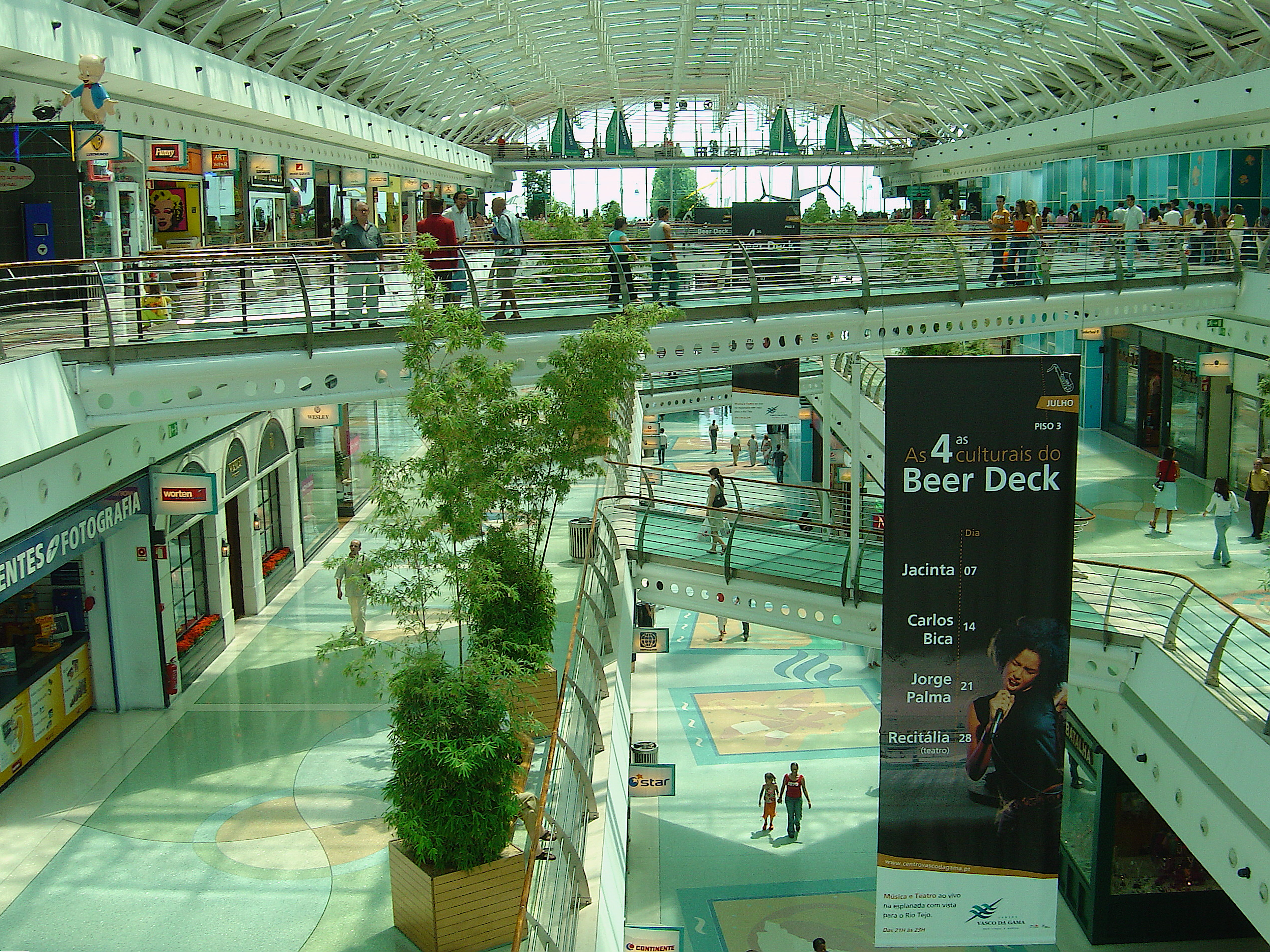 Centro Comercial Vasco da Gama - Lisboa (Portugal)